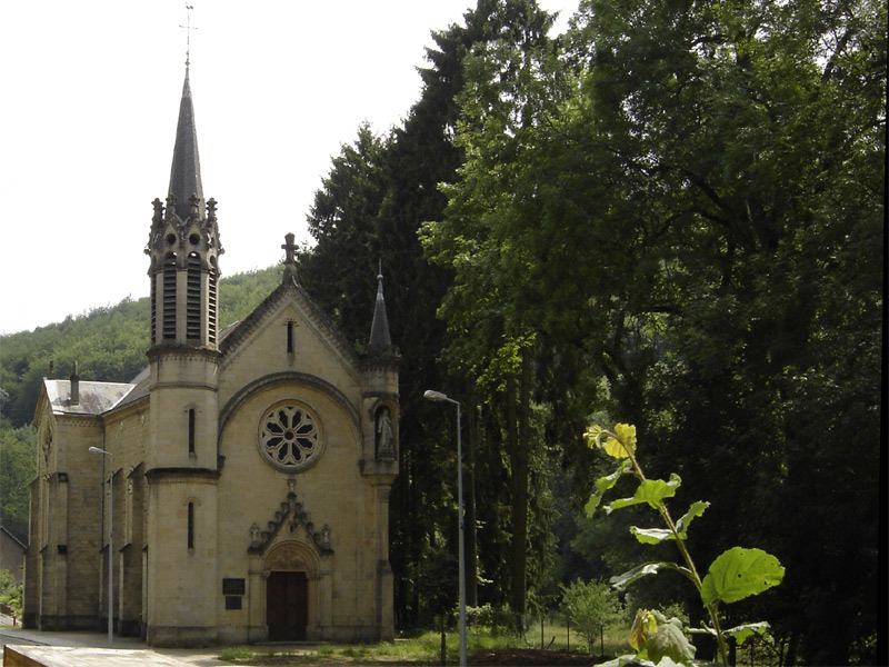 Kierch vu Zowaasch. Allgemenges zum Bild: Dëst Bild weist d'Kierch vu Zowaasch